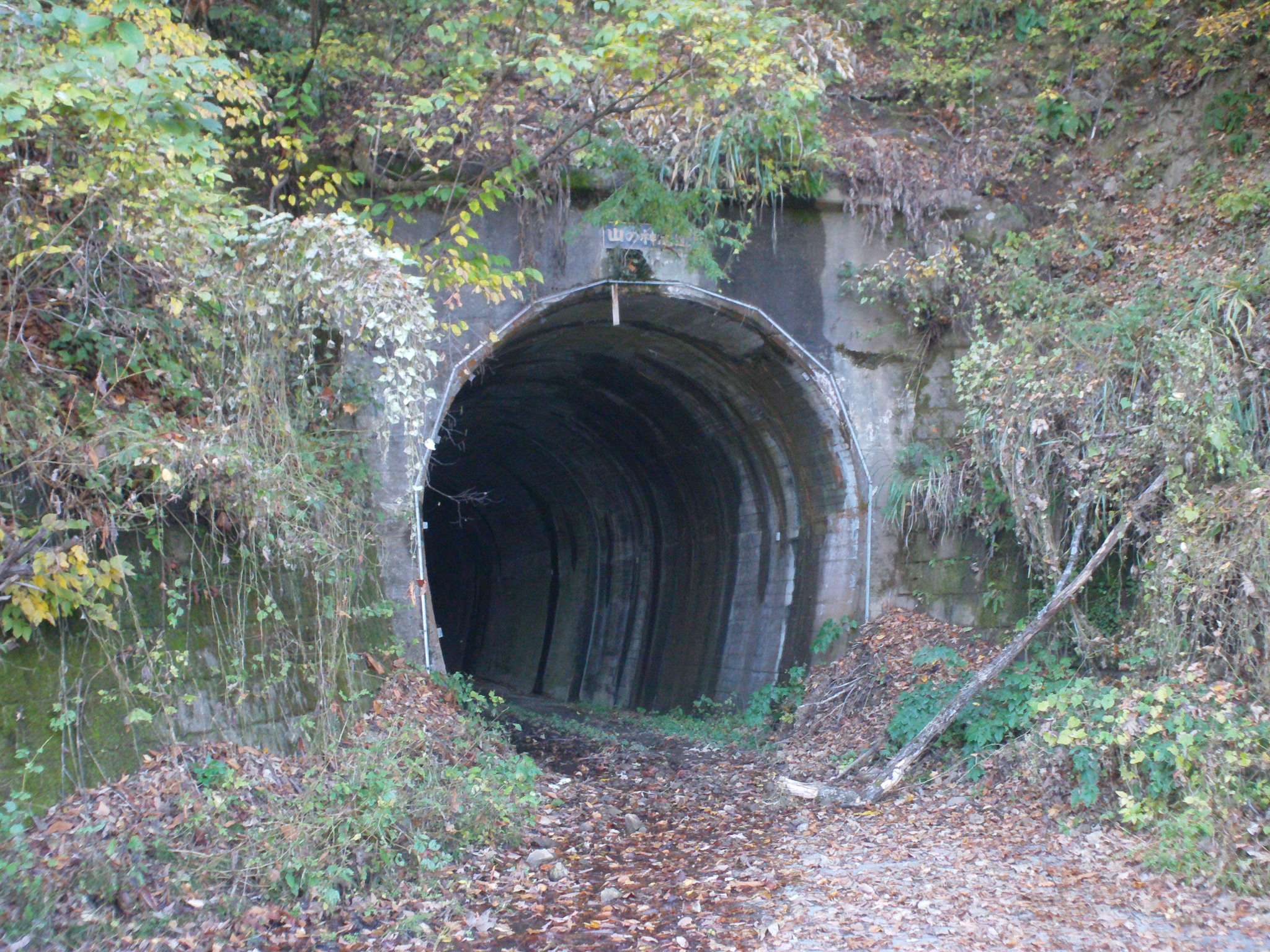 林道大山福光線旧道、山の神トンネル